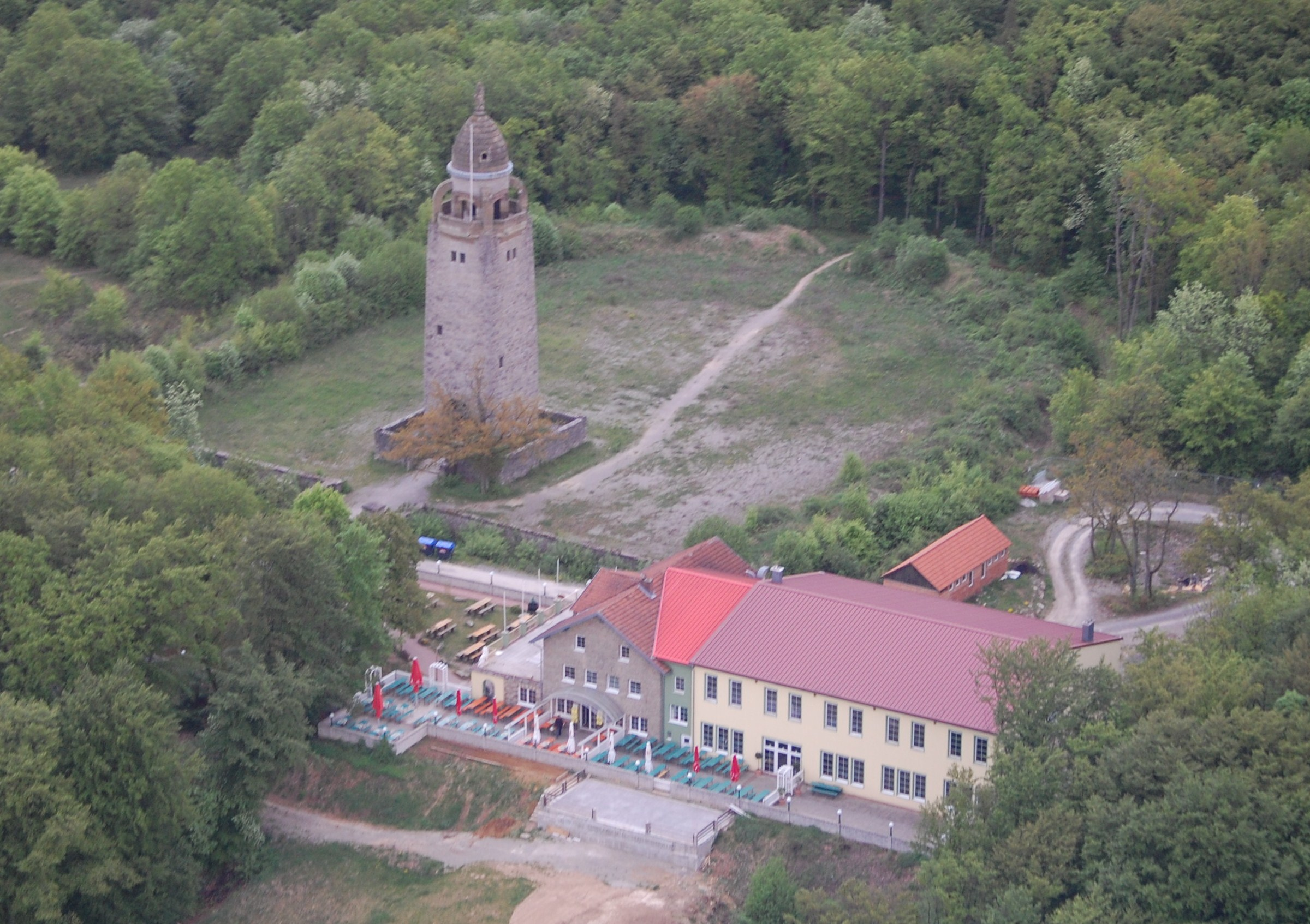 in Bad Kissingen mit Erlebnisbrauerei